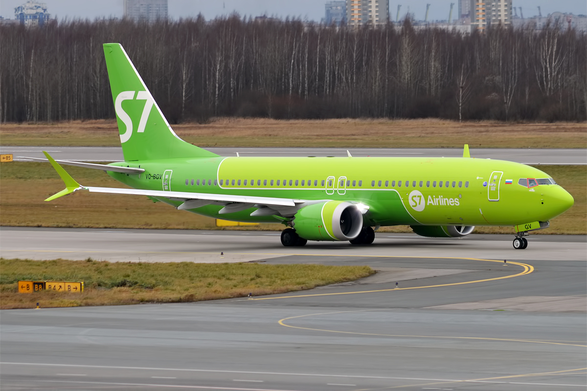 S7 Airlines, VQ-BGV, Boeing 737-8 MAX